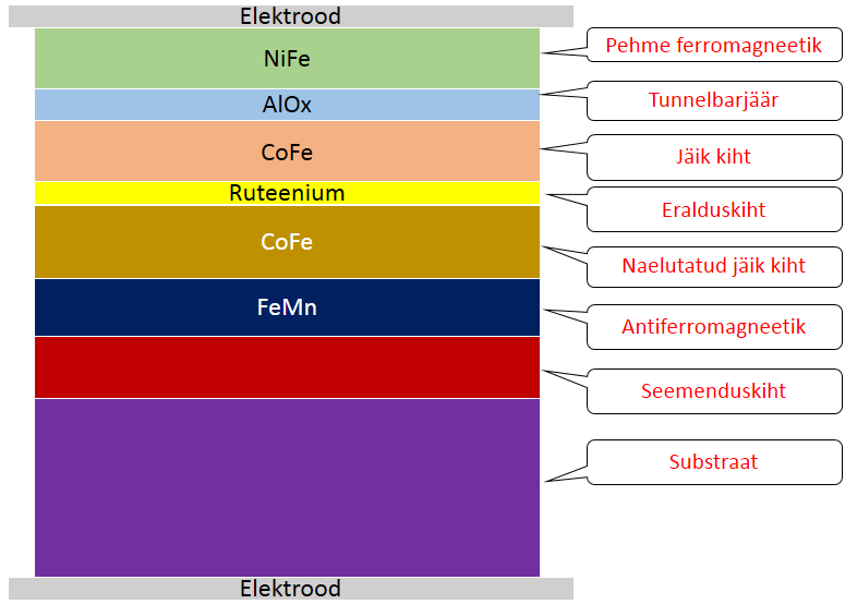 Tunnelsiirdega spinnventiili kihtstruktuur